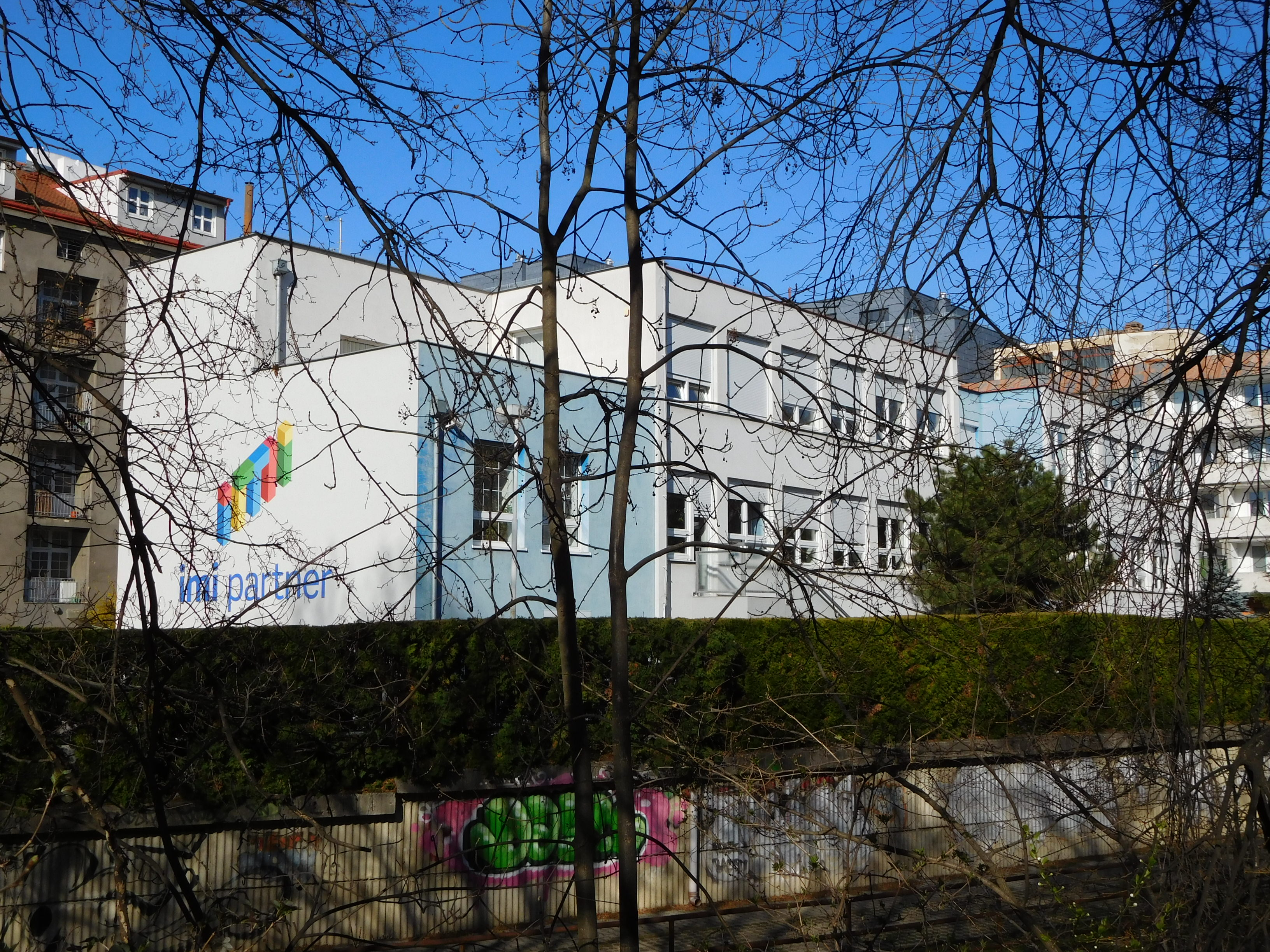 Praha - Vršovice, Rostovská 2a